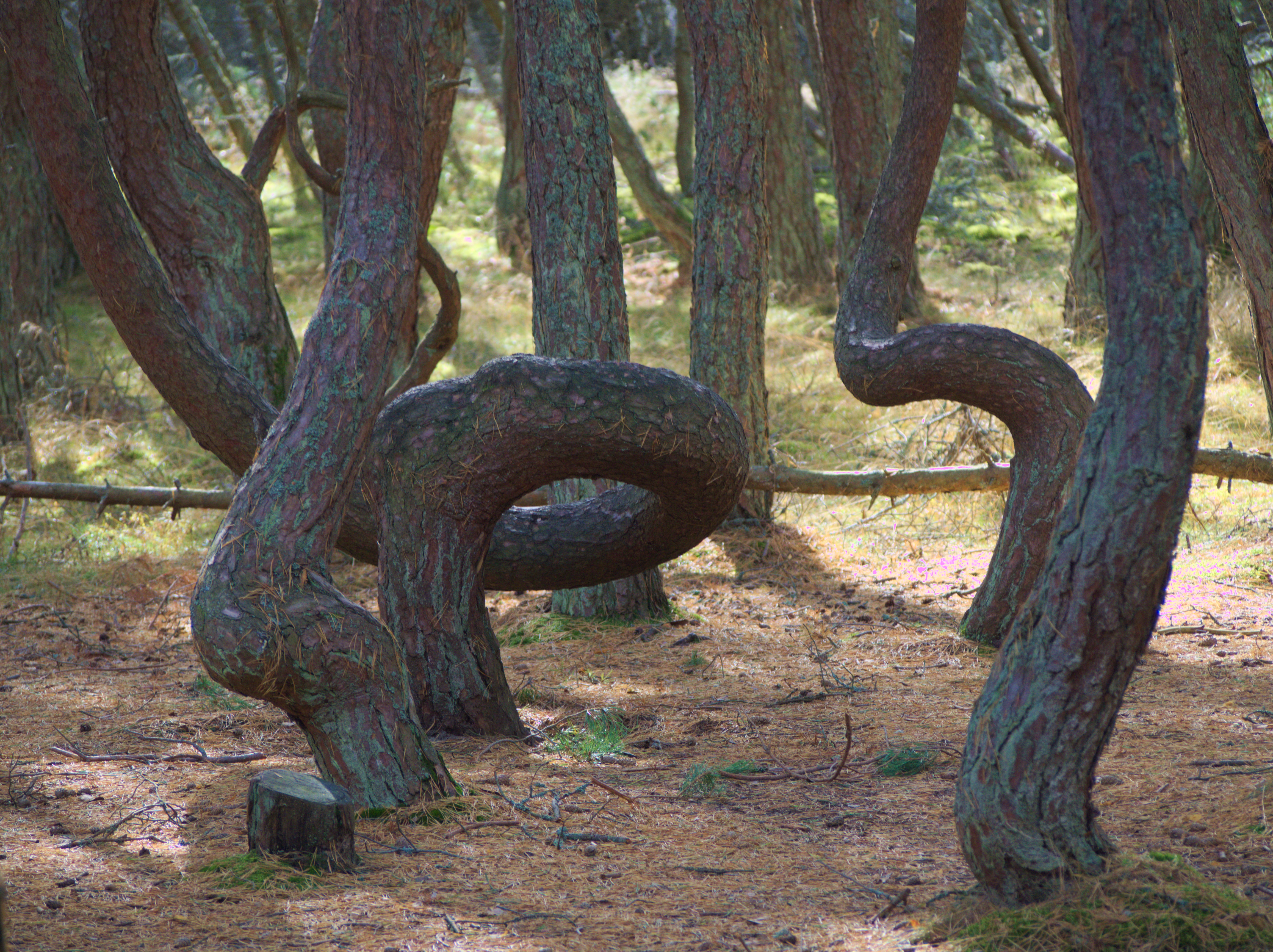 Национальный парк Куршская коса: Зеленоградский район, Калининградская область